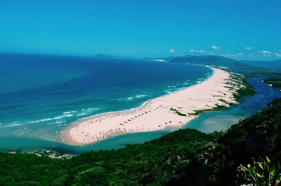 A foto foi tirada em uma viagem que fiz para Florianópolis-SC (Brasil). Essa praia leva o nome de Guarda do Embaú e é muito famosa em todo país.